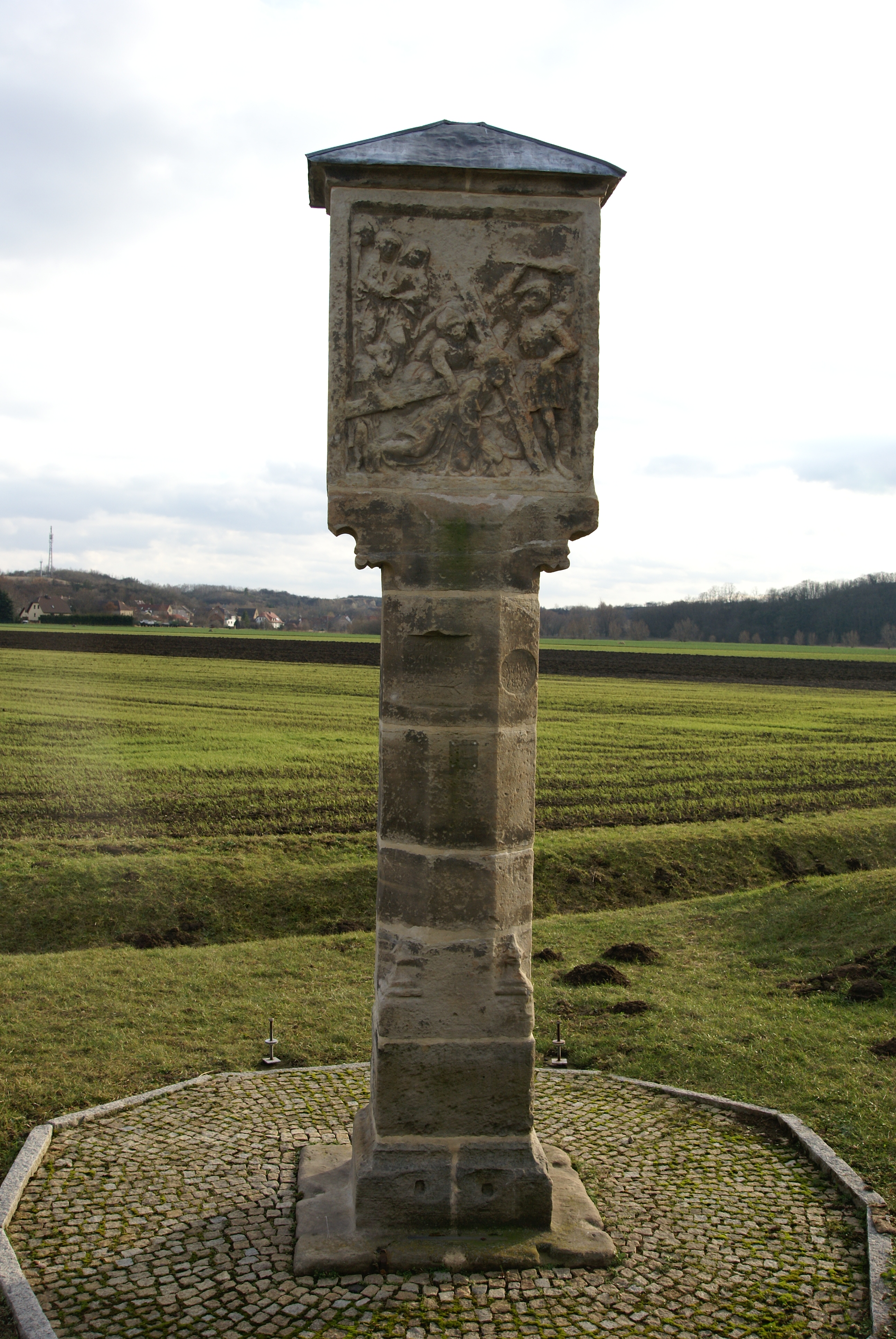 die Betsäule von Zappendorf